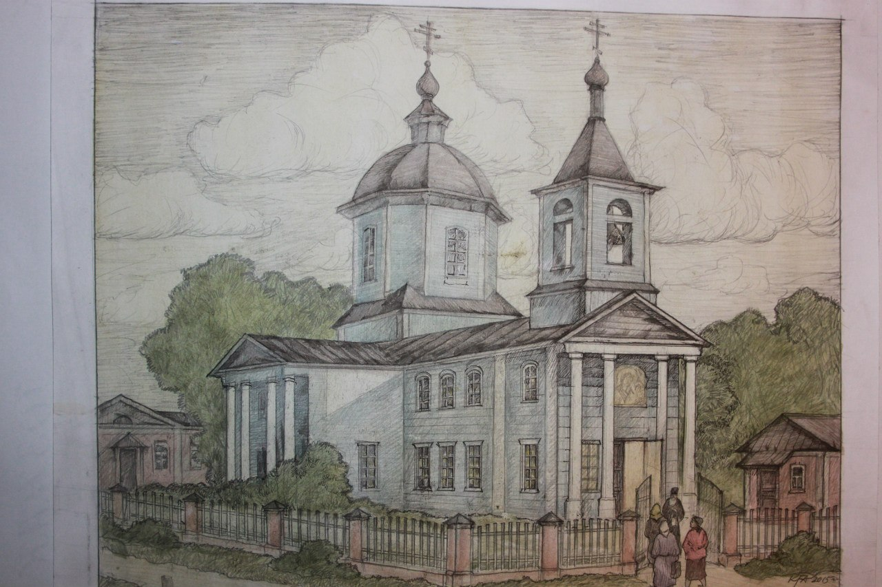 эскиз старого храма села Богатое, разрушенного в 1937 году. Рисунок сделан на основании свидетельств очевидцев.